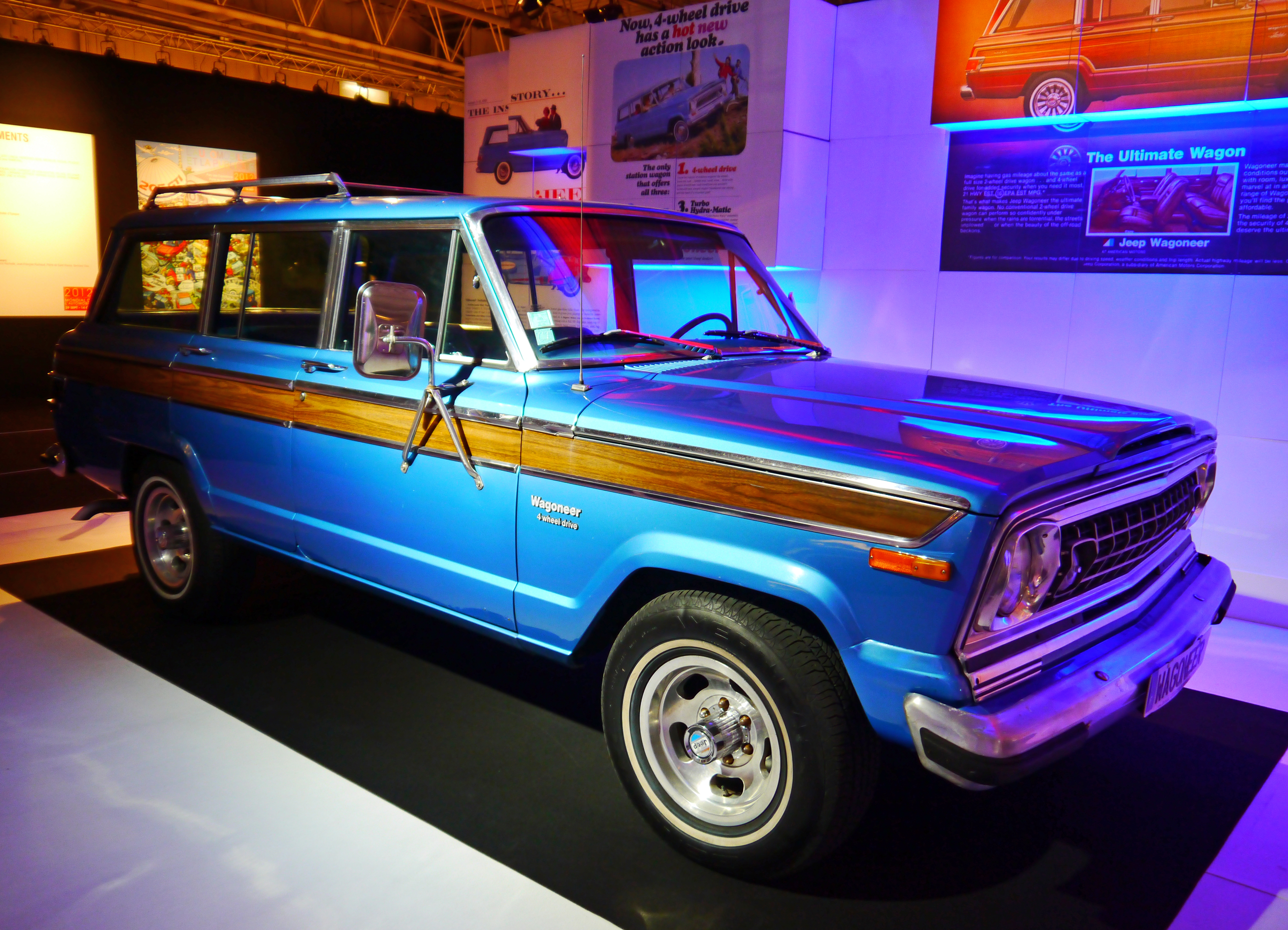 1973-1979 Jeep Wagoneer Quadra-Trac 4-Wheel Drive.